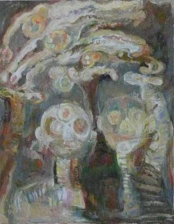 Ölgemälde von Heidrun Borgwardt von 1996, zeigt Artisten